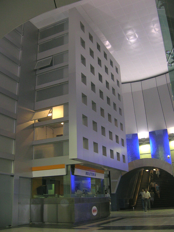 Boleteria